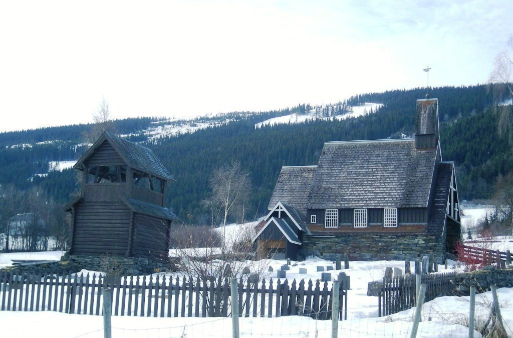 Øyjar kapell, Vestre Slidre